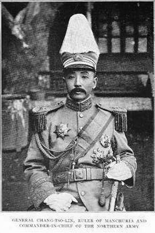 张作霖